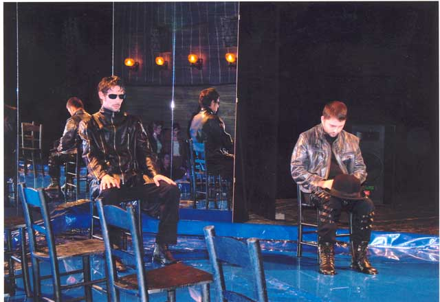 Moja fotografija.